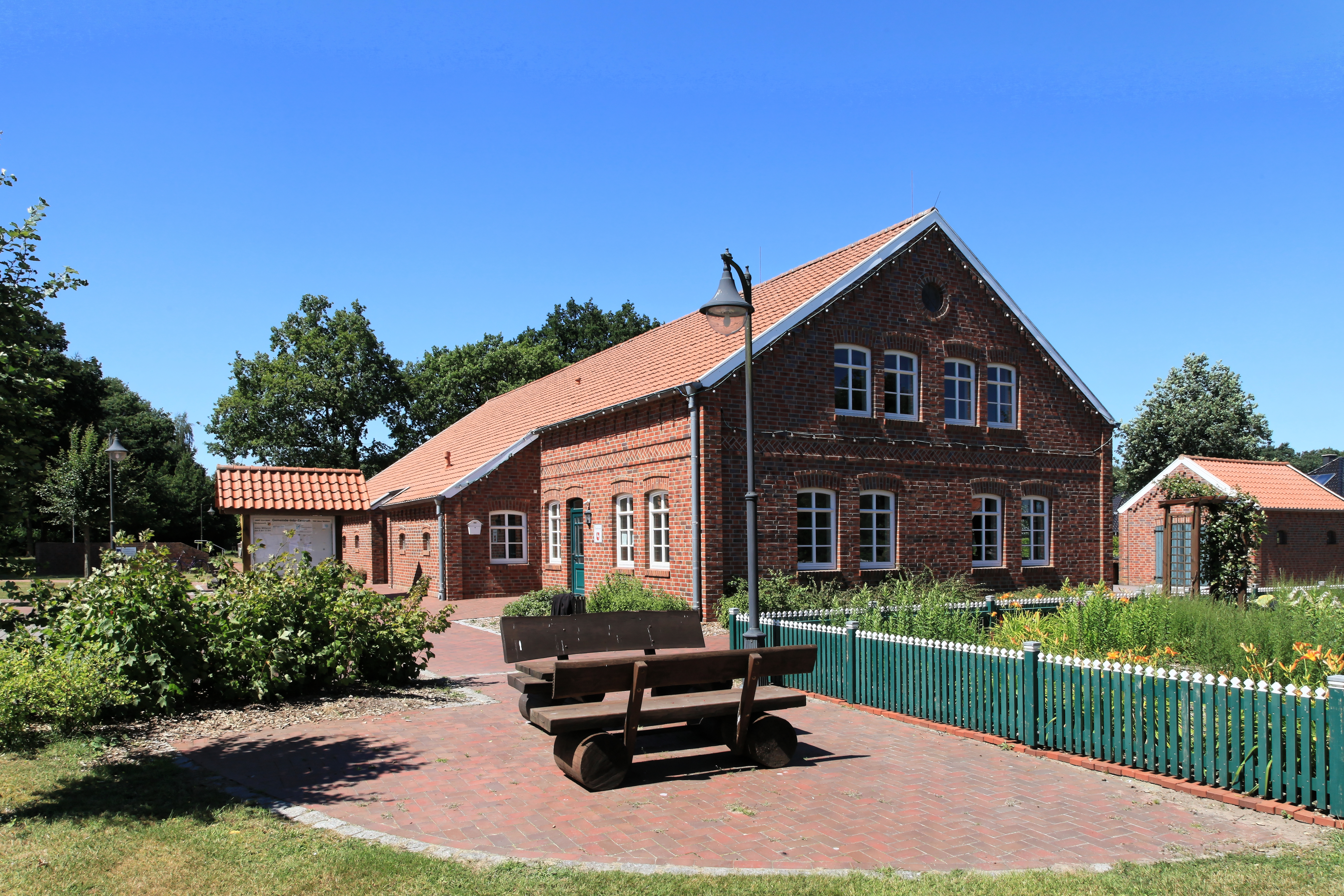 Heimathaus und Bauerngarten im Heimathof, Schützenstraße in Walchum